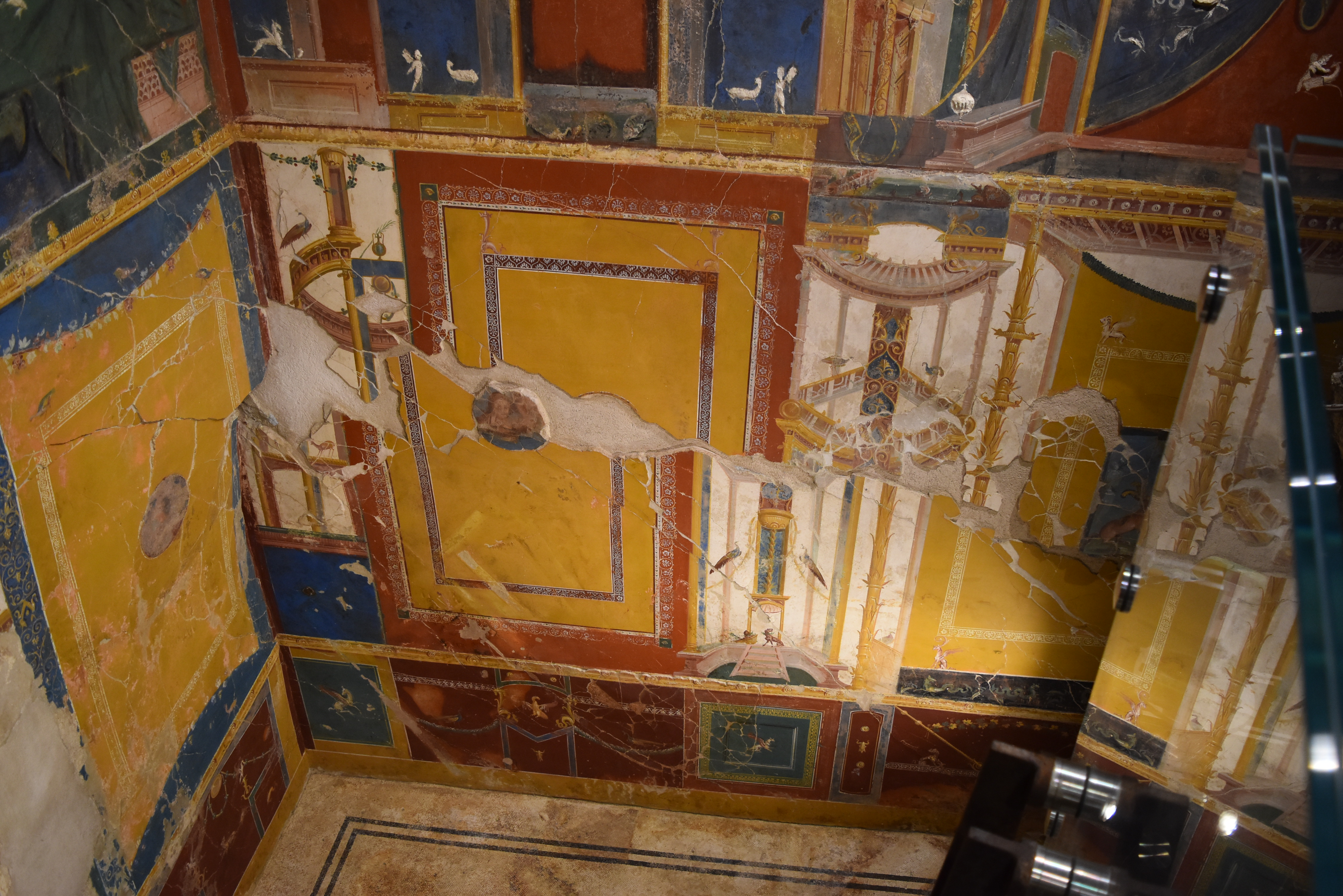 Gli affreschi della Villa Romana di Positano